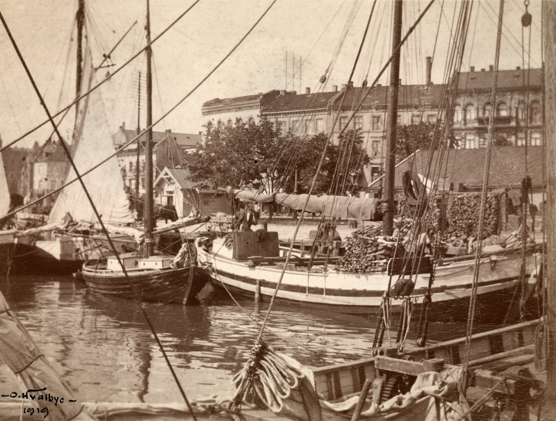 Fiskeskøyter i Pipervika, havn, vedjakt, vedstabel, fiskeskøyte, bygårder. Oscar Hvalbye (1864-1938) tok teologisk embetseksamen 25 år gammel. Han arbeidet for bymisjonen (Kristiania Indremisjon) og var prest i Sagene menighet. Som ivrig amatørfotograf samarbeidet han med sin gode venn Anders B. Wilse. Han var virksom i Oslo i perioden ca 1890-1920. Hans fotosamling ble i 1986 gitt til Oslo Bymuseum.